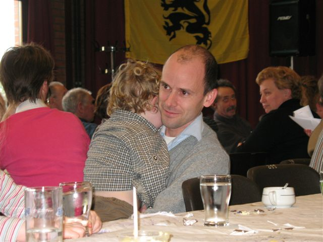 Belgian politician Louis Ide, N-VA Gent, 2008